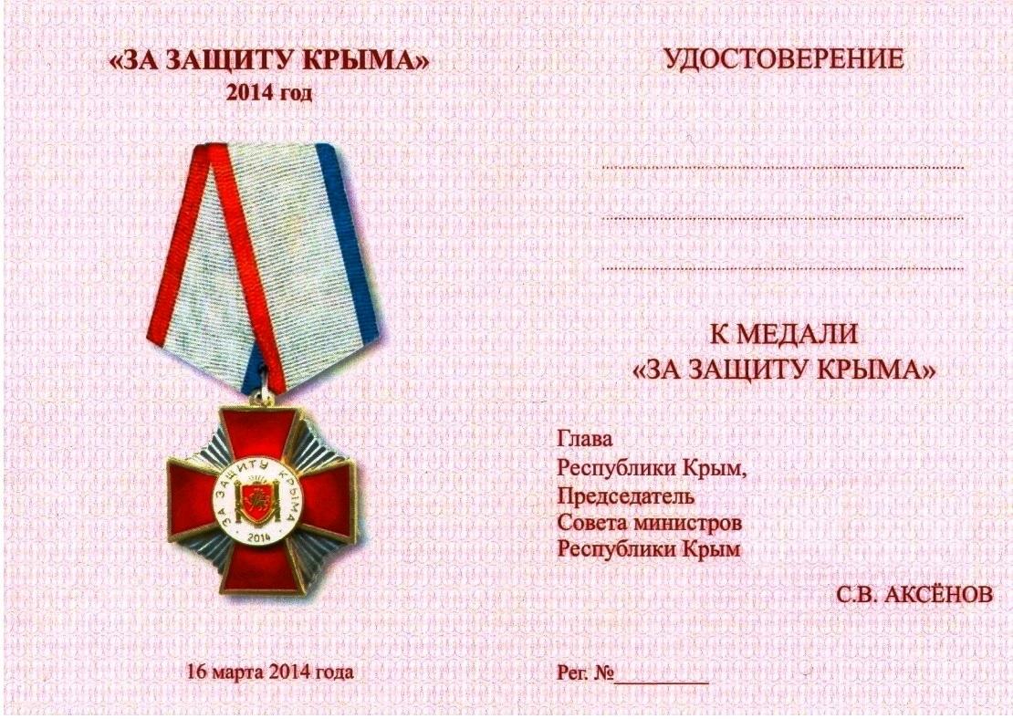 Медаль «За защиту Крыма» (удостоверение)